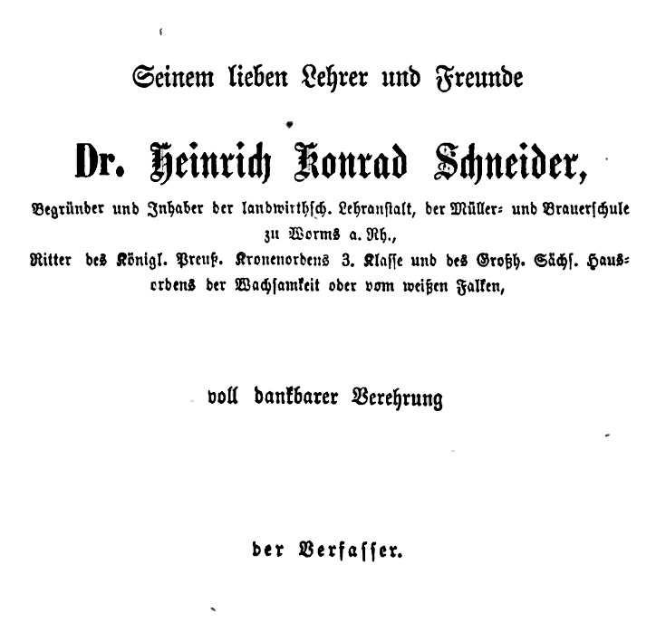 Hermann Franz (1841-1908), Dedikation seiner Dissertation (1873) an Heinrich Jonrad Schneider (1828-1898), Direktor der Wormser Akademie für Bierbrauer und Landwirte